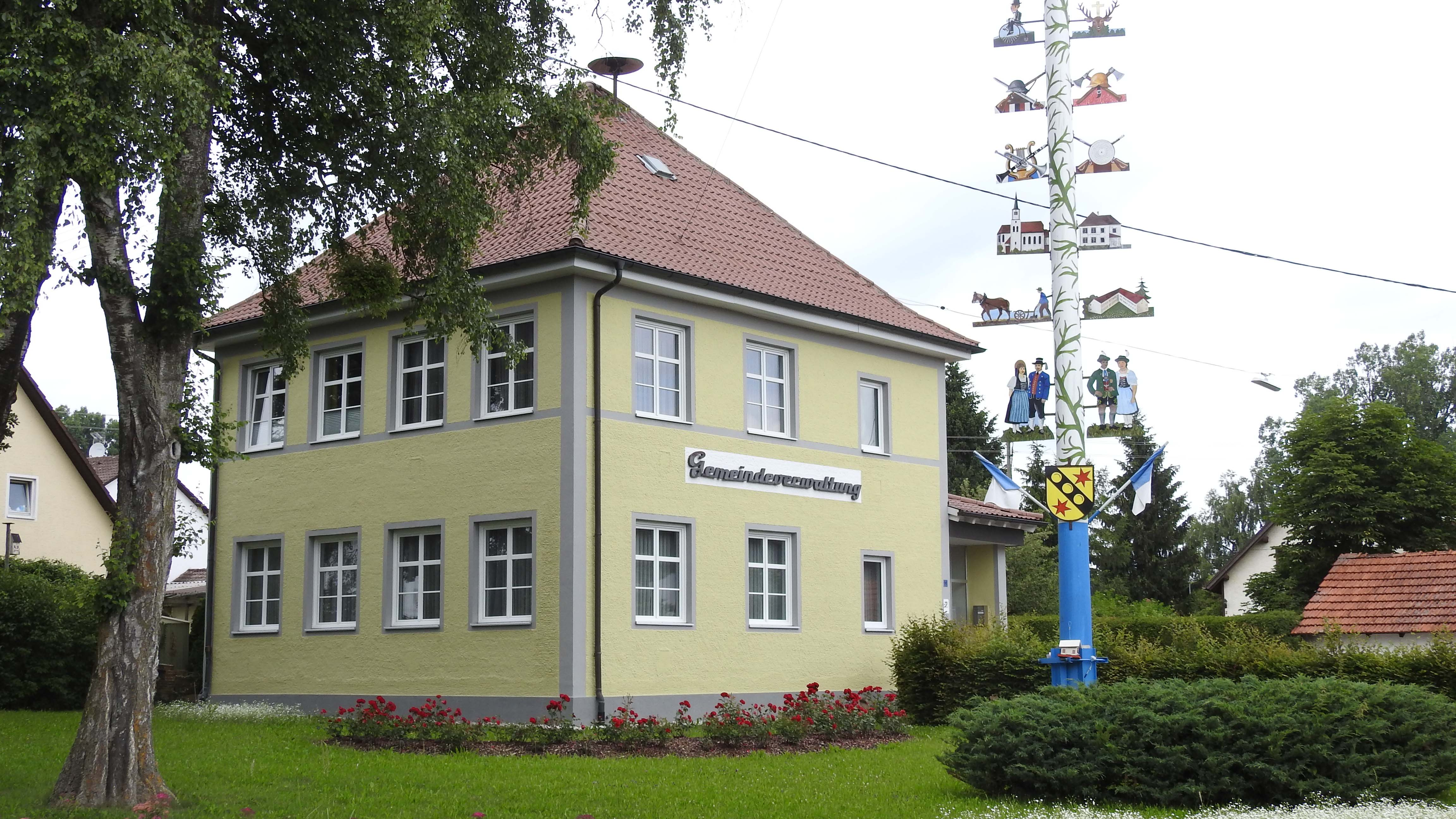 Rathaus in Westendorf (Allgäu)